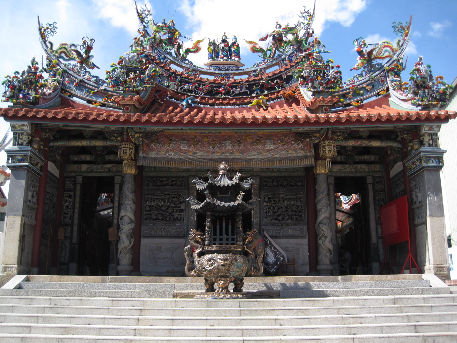 臺南興濟宮